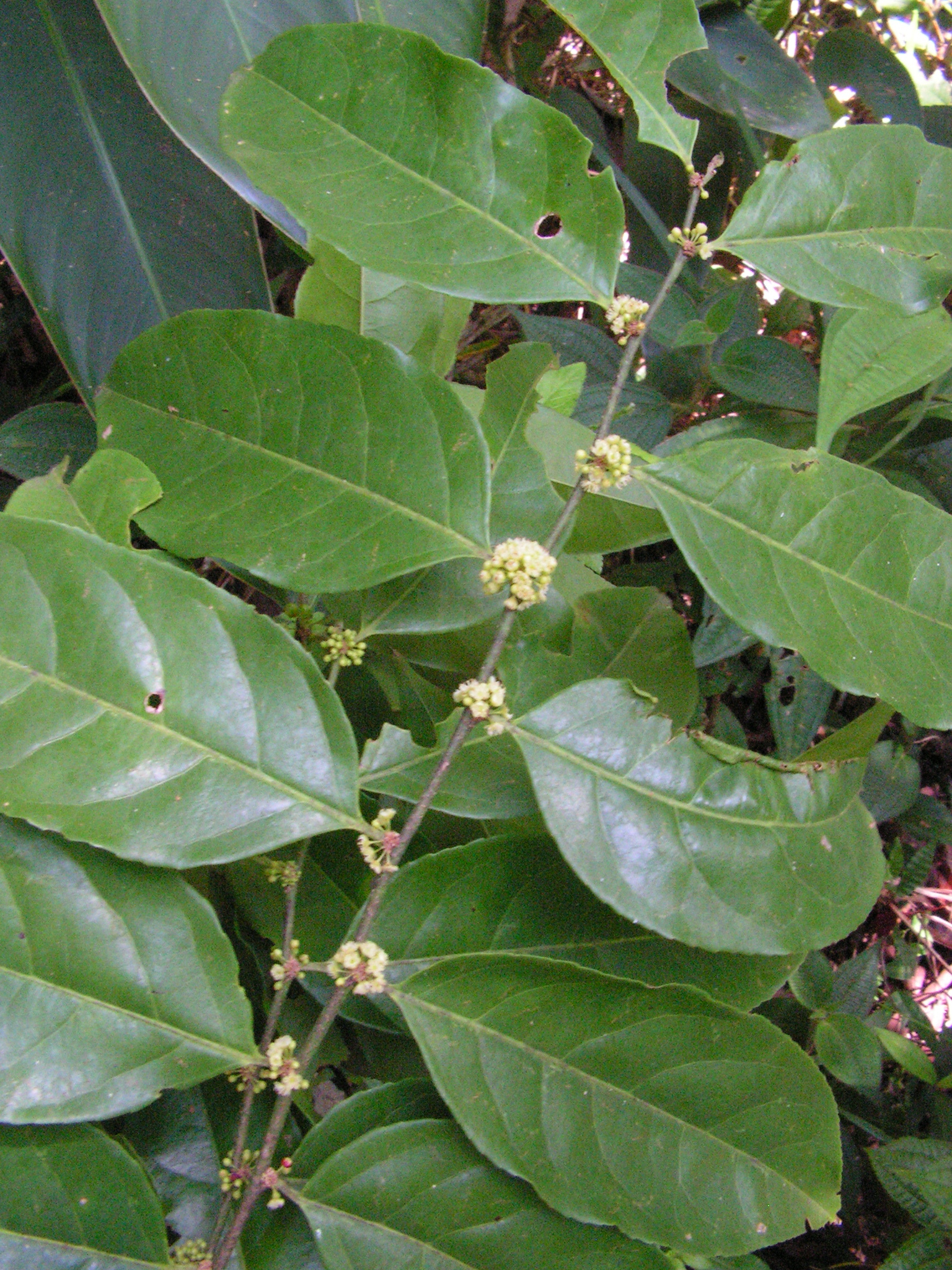 Casearia sylvestris, Lagoa dos Gatos, Pernambuco, Brasil